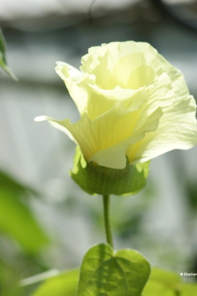 Gossypium Barbadense